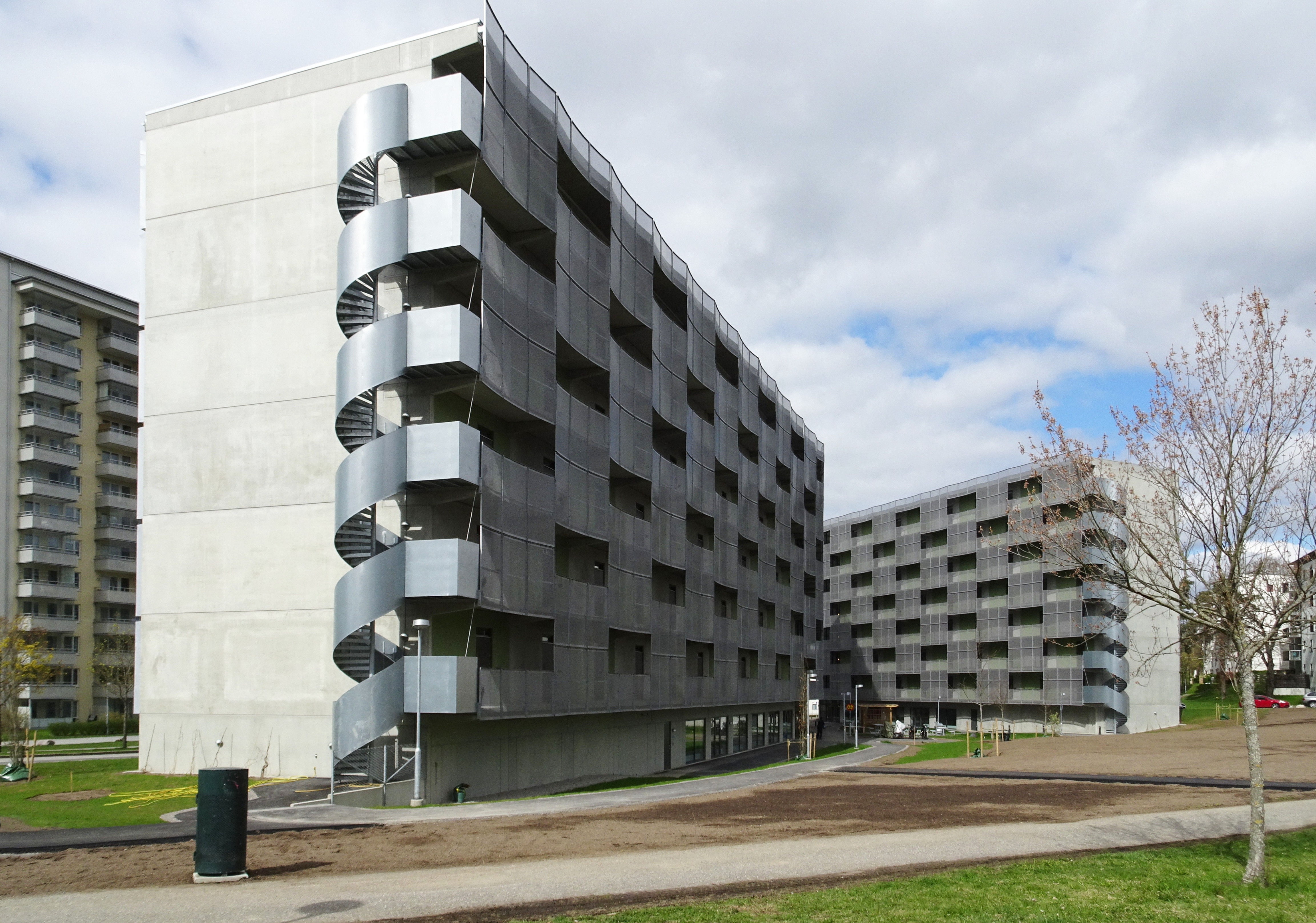 "Snabba Hus Råcksta", Råckstavägen 4-6, byggherre Svenska bostäder, arkitekt Andreas Martin-Löf Arkitekter, byggår 2019